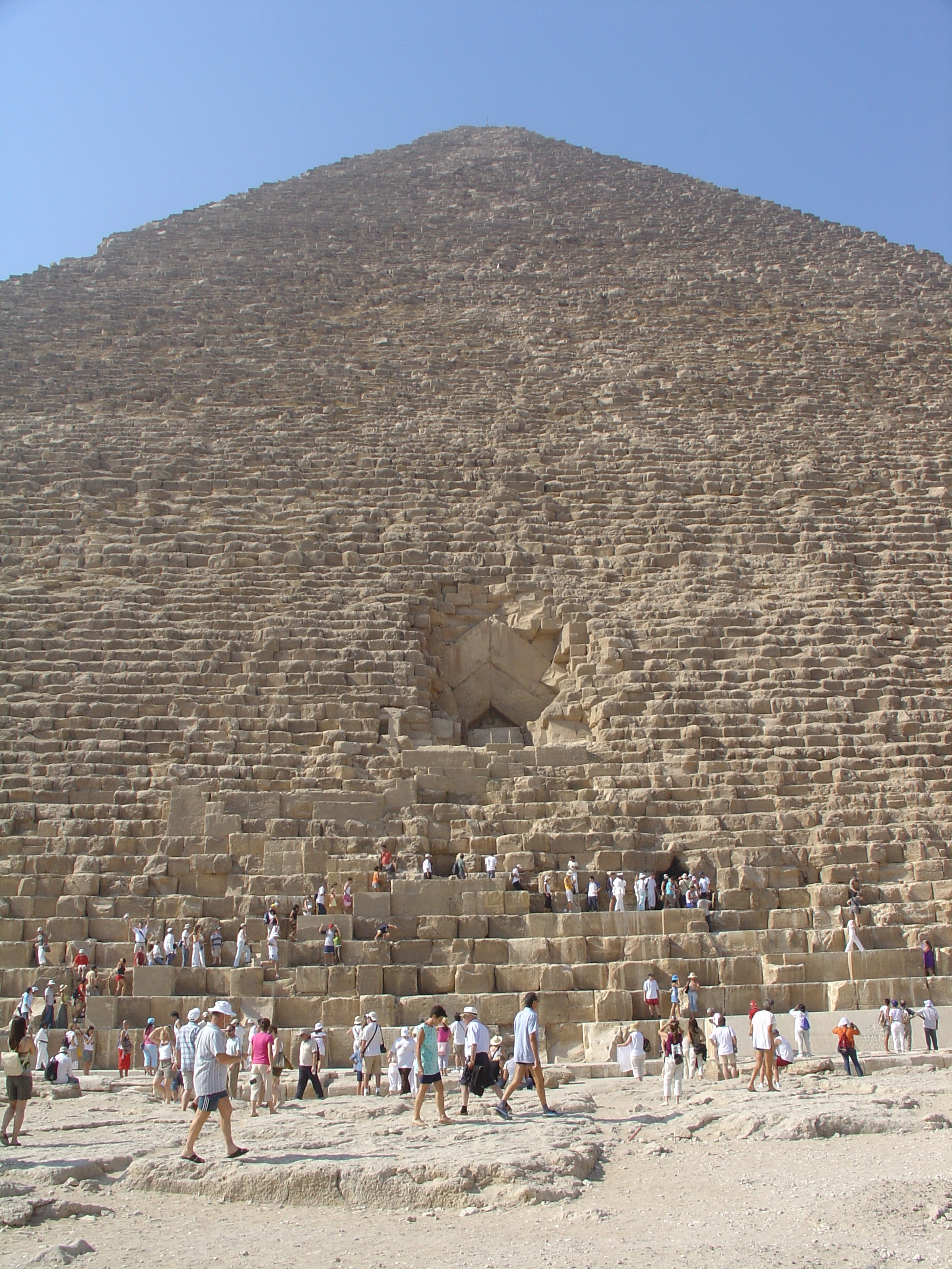 Shot by Espen Birkelund